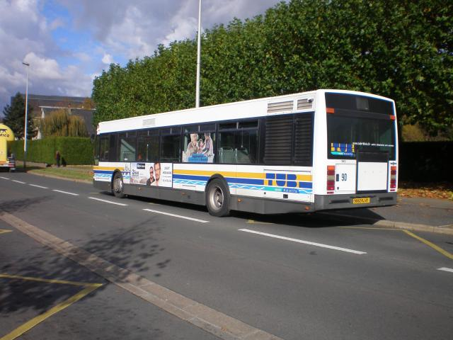 Bus Vanhool A330 Première Génération avec la livrée TUB